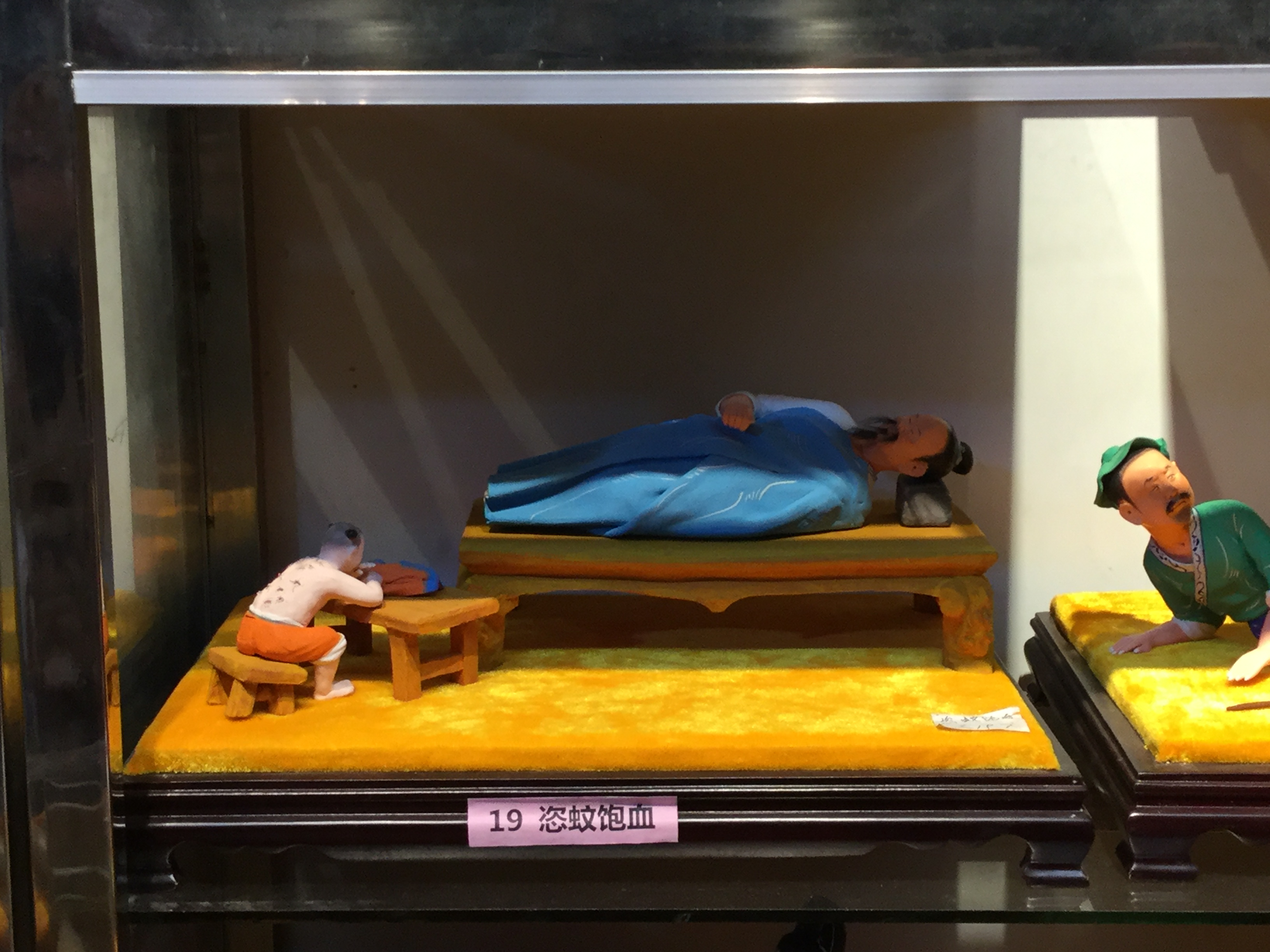 翁仔灯《恣蚊饱血》，摄于2018年3月2日。